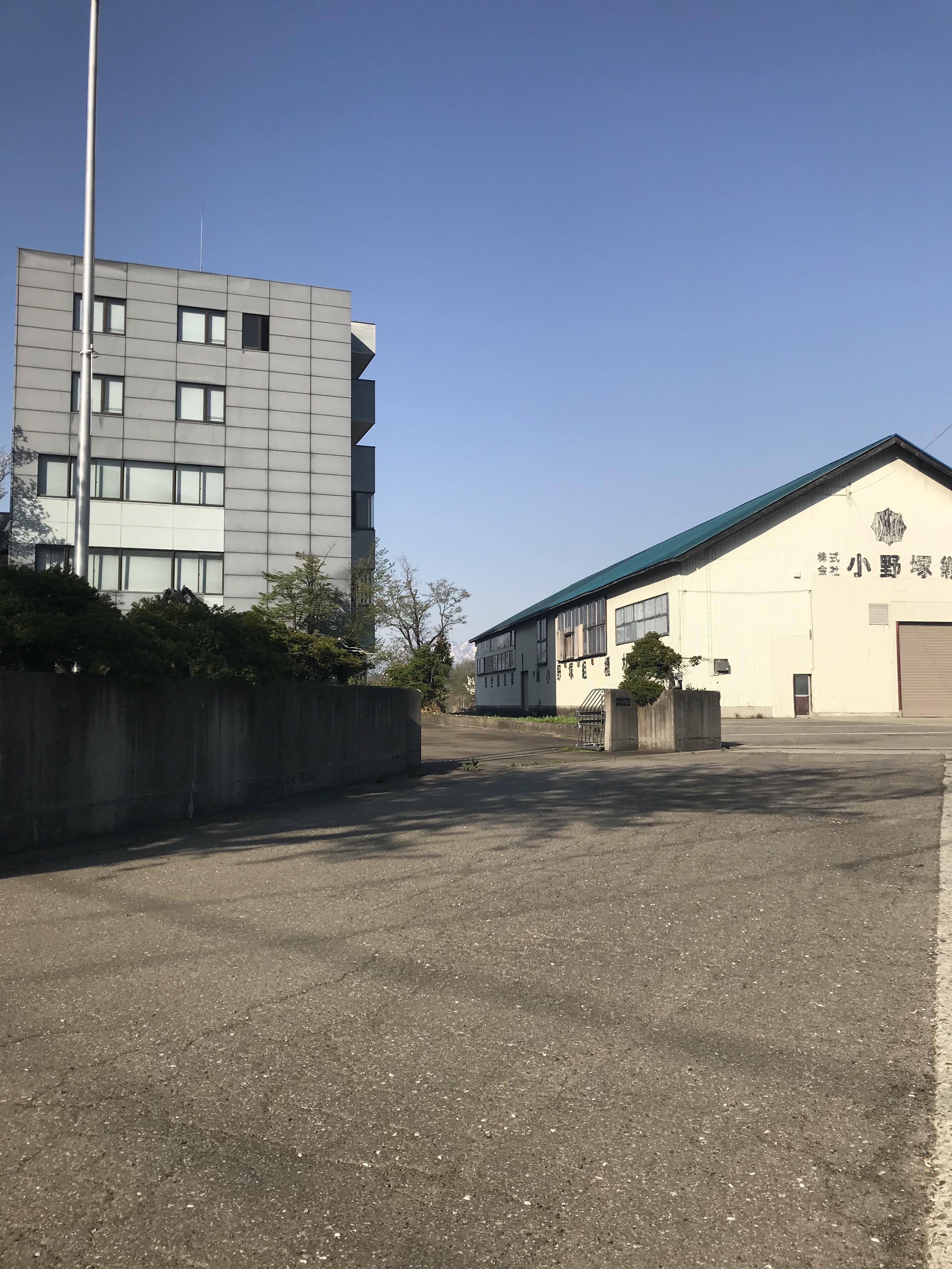 建設会社写真